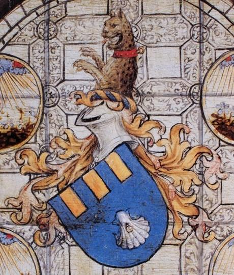 Wappen des Maarten van Nieuwenhove (* 1463, gest. 1500) aus Brügger Patrizierfamilie, 1492 Ratsherr, 1497 Bürgermeister von Brügge: In Blau unter drei goldenen Pfählen im Schildhaupt eine silberne Jakobsmuschel. Auf dem blau-golden bewulsteten Stechhelm mit purpur-goldener Helmdecke ein wachsender, naturfarbener Luchs mit golden-beringtem rotem Halsband.